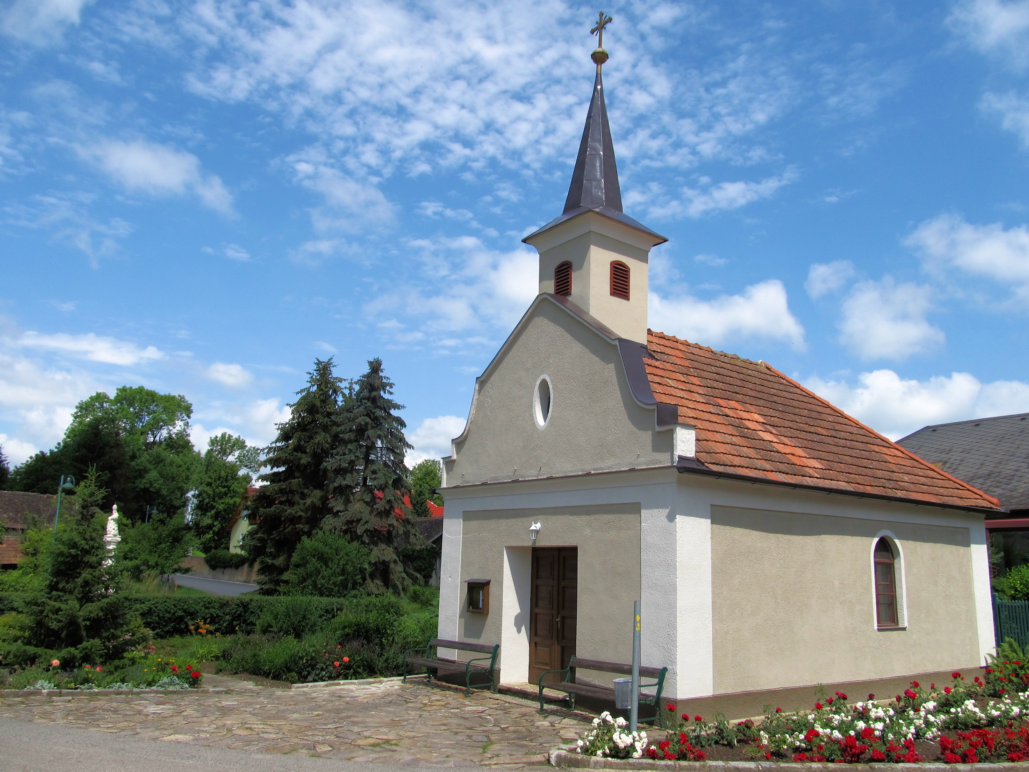 Ortskapelle